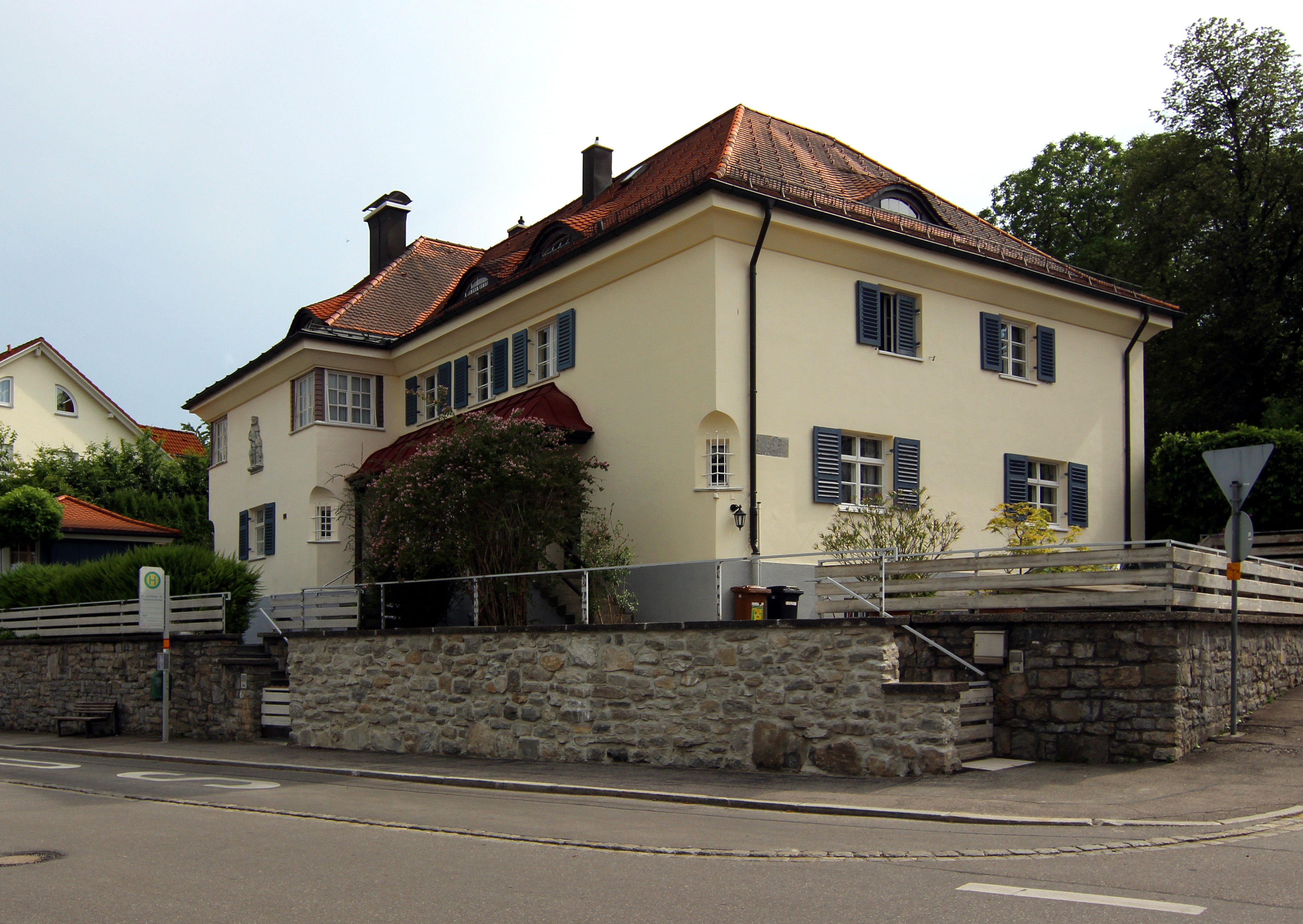 Doppelwohnhaus auf dem Haubenschloss (noch heute bekannt als „Ákos-Haus“), Maler-Lochbihler-Straße 13 und 15: Neubau und Einrichtung, Fresko an der Hauswand - Architekt Andor Akos